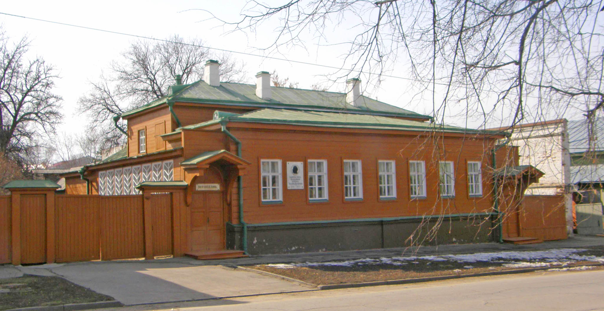 Дом семьи Ульяновых в Симбирске